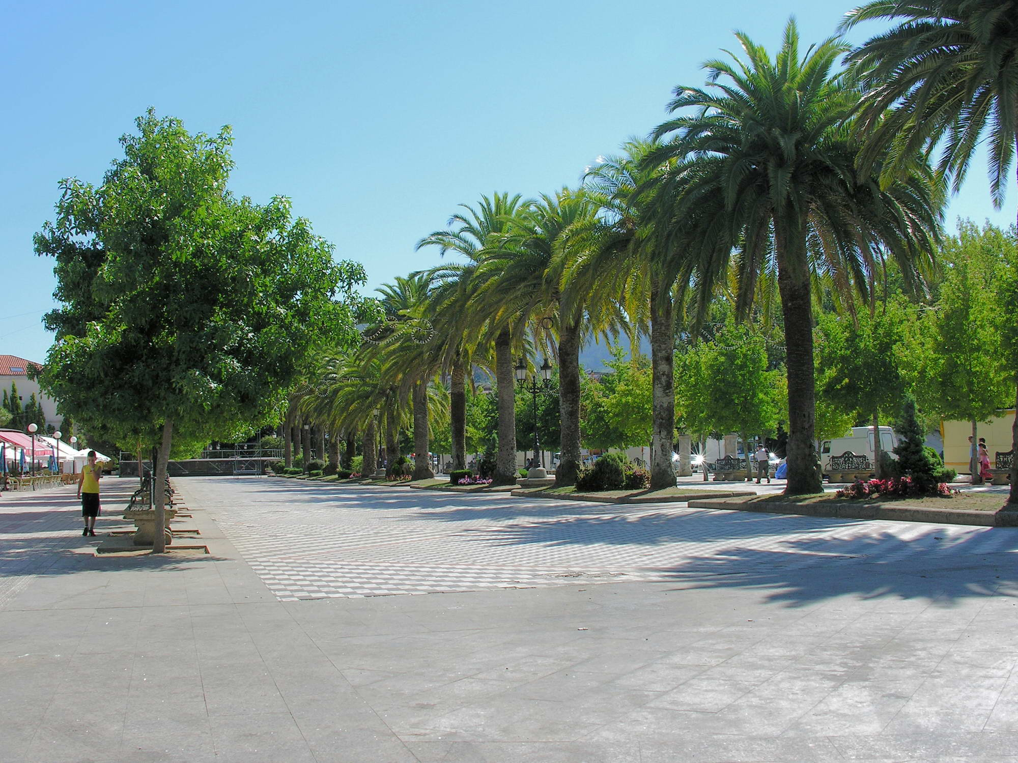 Noia, Galicia Publish by= Luis Miguel Bugallo Sánchez.